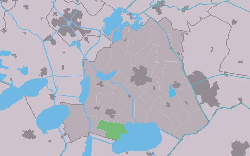 Kaartsje fan himrik fan Dunegea